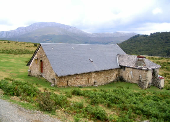 Chapelle Saint Sauveur à Mendive (route d'Iraty) Pyrénées).